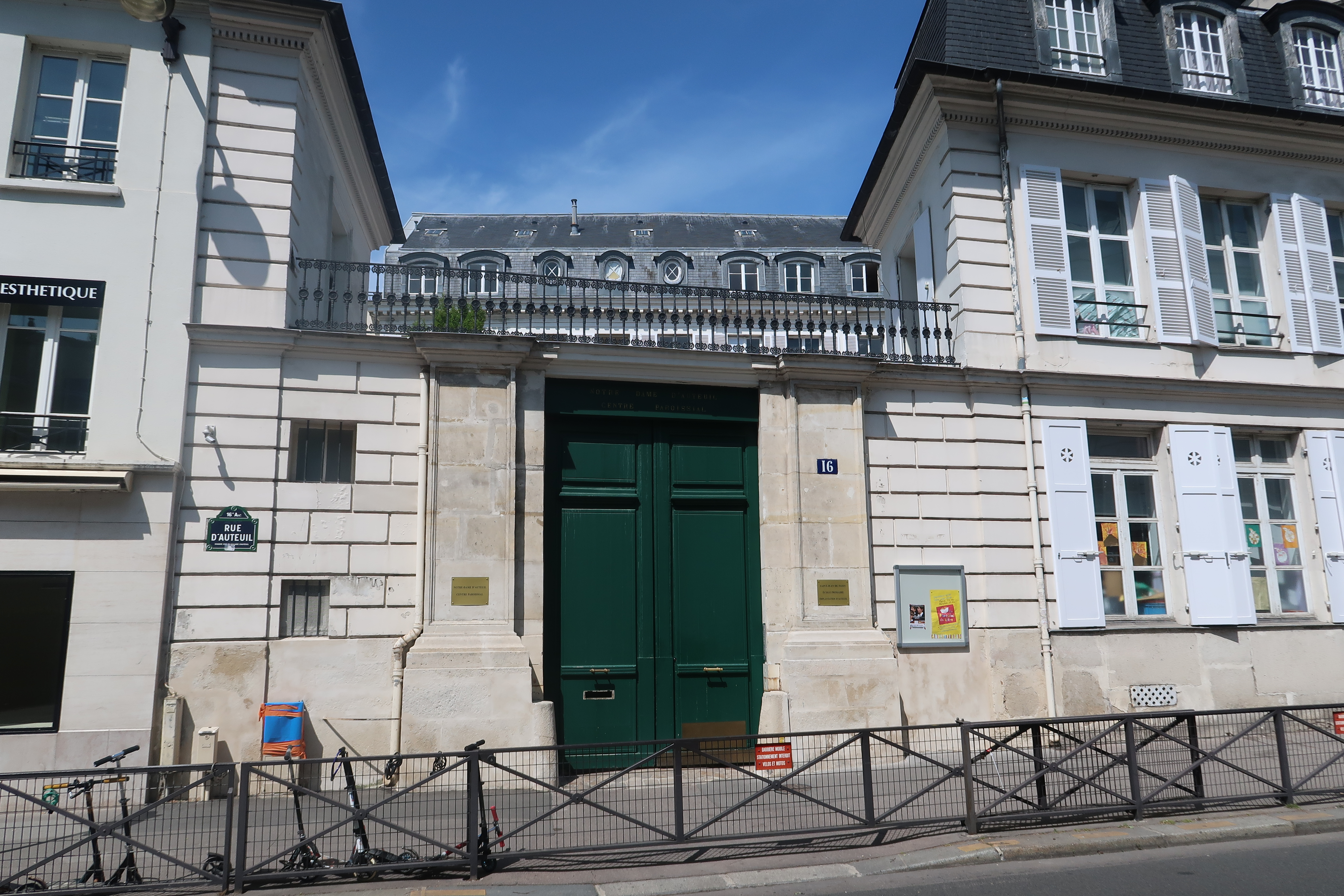 Hôtel Véron, centre paroissial Notre-Dame-d'Auteuil, 16 rue d'Auteuil (Paris, 16e).